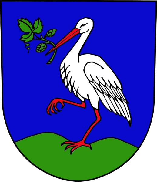 Znak Bratrušova